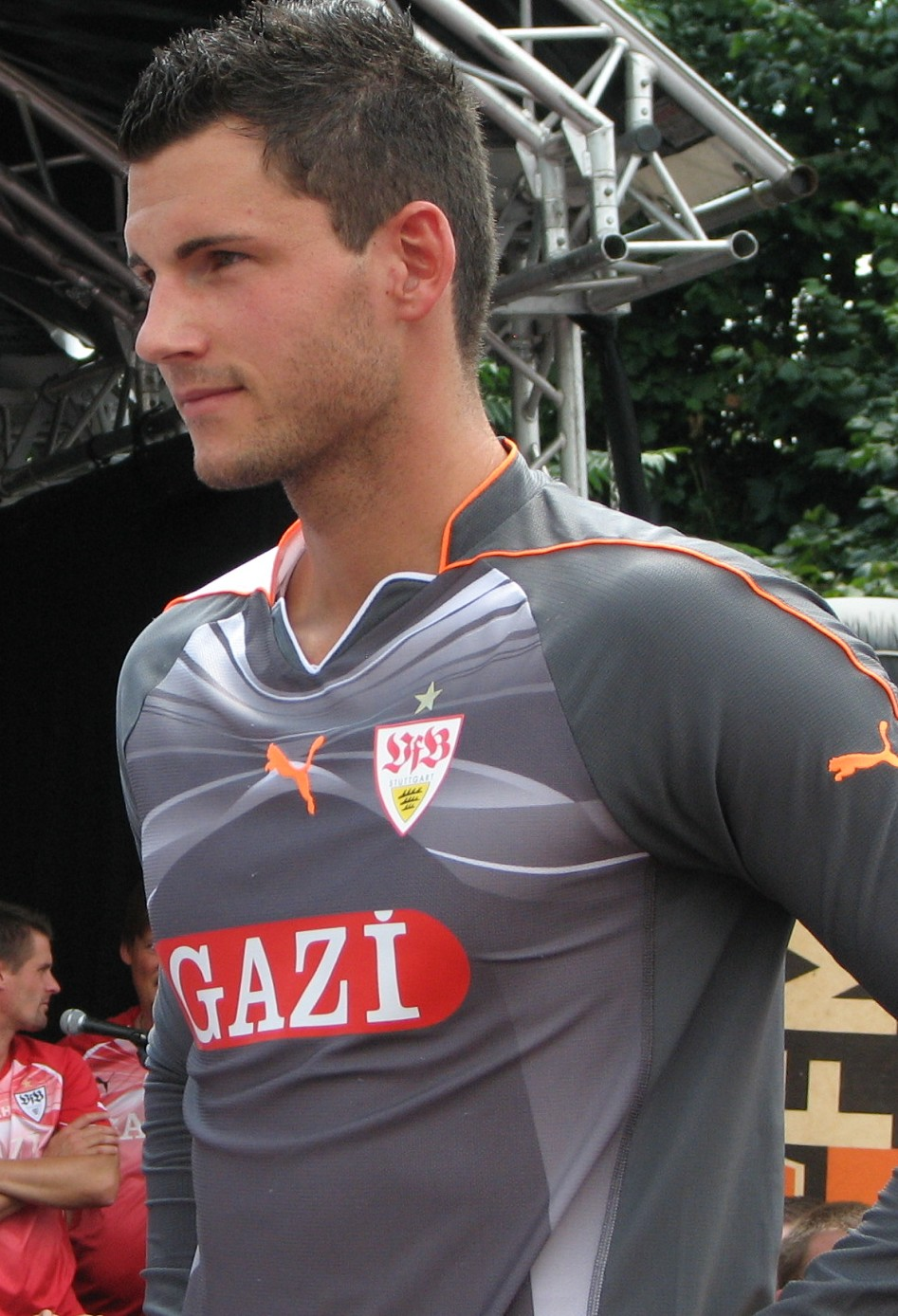 Alexander Stolz beim Saison Opening 2010. Aufgenommen von